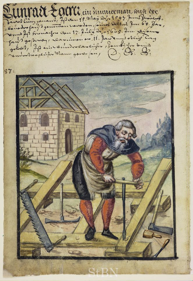 Cunradt (Konrad; Kunz) Egerer, Zimmerman (Zimmermann) Transkription und weitere Informationen